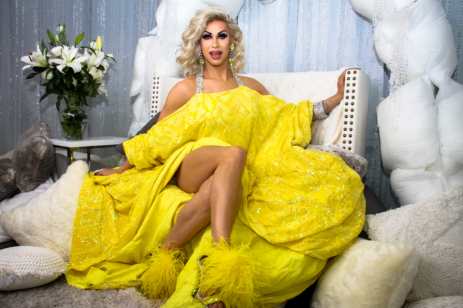 Rupaul's DragCon 2019